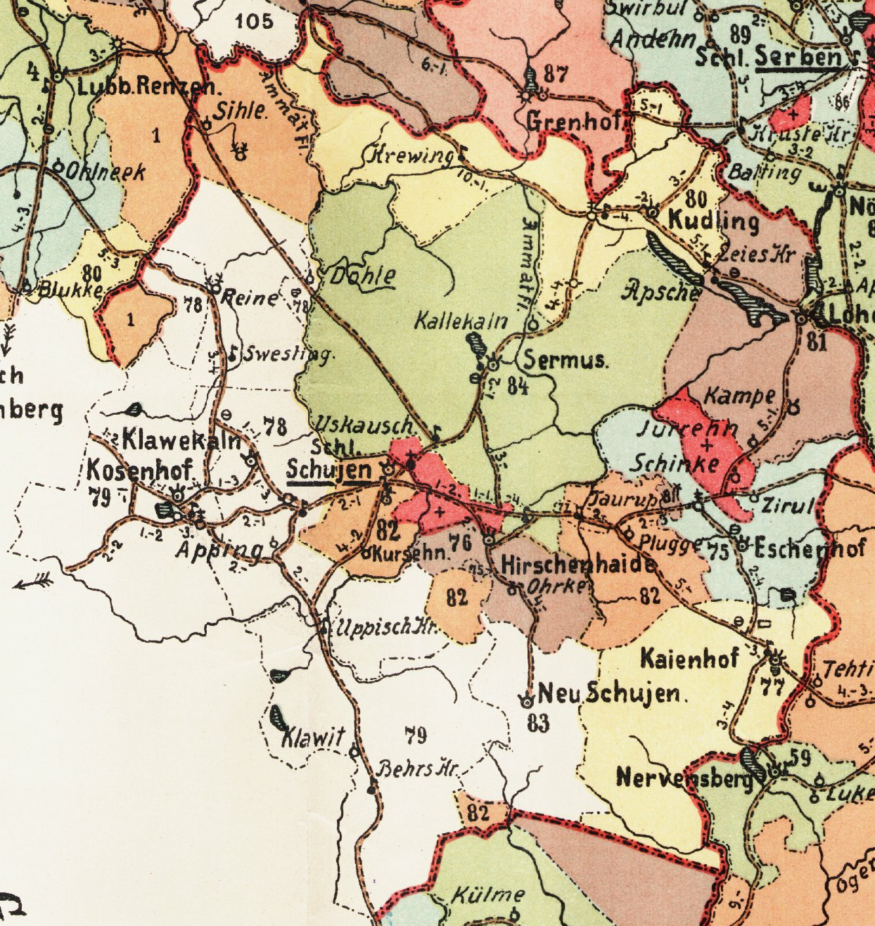 Skujene kihelkonna mõisad 1903. aasta kaardil.